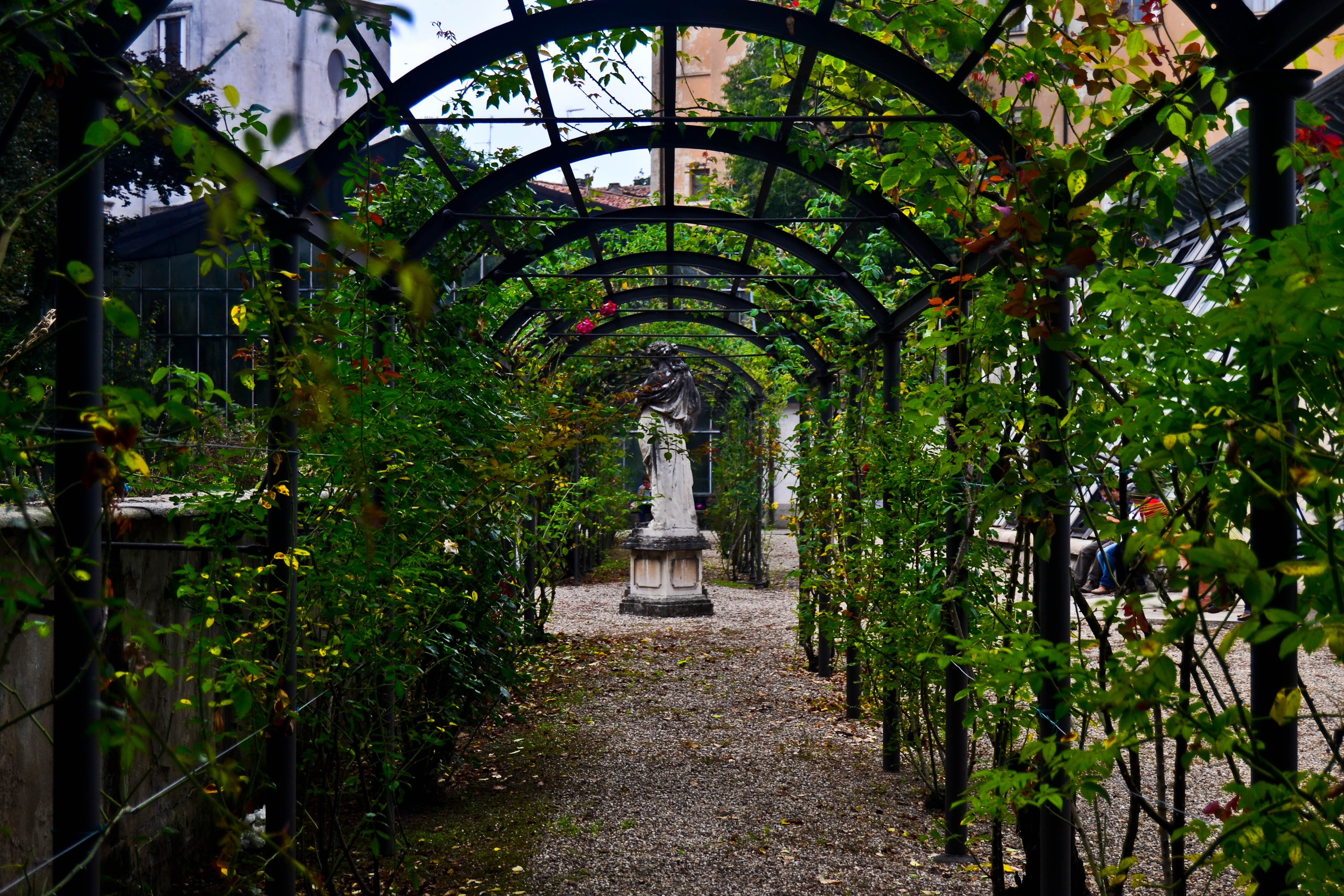 Orto Botanico dell'Università di Pavia This is a photo of a monument which is part of cultural heritage of Italy.